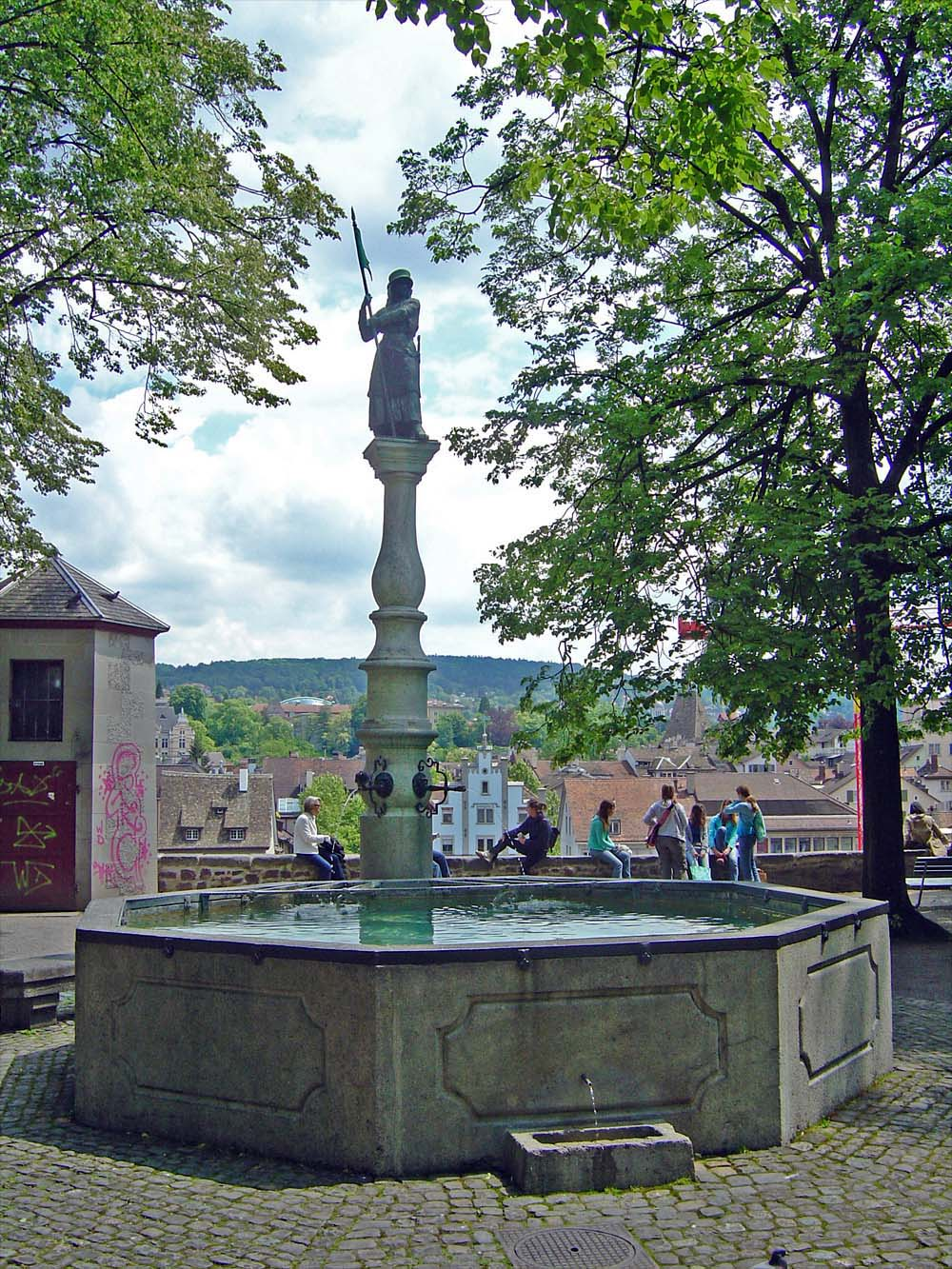 Brunnen (errichtet 1912) zu Ehren der heldenhaften Zürcherinnen auf dem Lindenhof in Zürich. Brunnenfigur von Gustav Siber, 1912